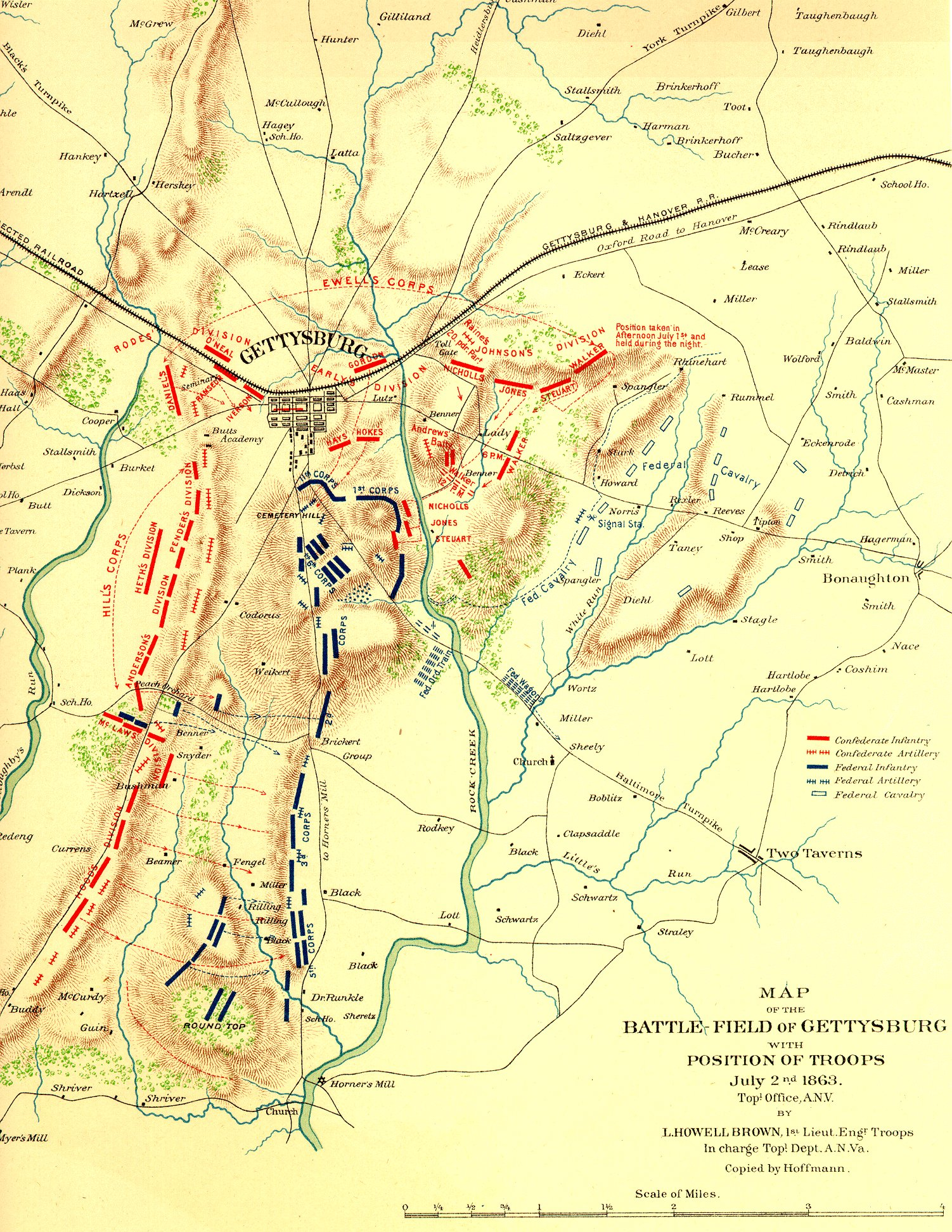 Topografische stafkaart van de Slag bij Gettysburg Opgesteld door de topografische dienst van het Army of Northern Virginia Juli, 1863 Publiek domein -- auteursrecht op deze kaart heeft nooit bestaan